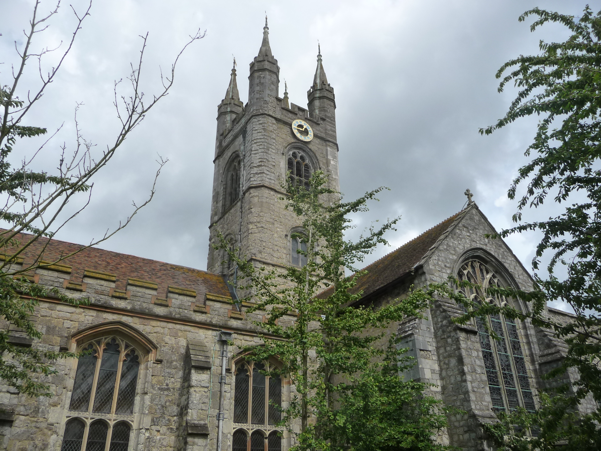 Church in Ashford, Kent